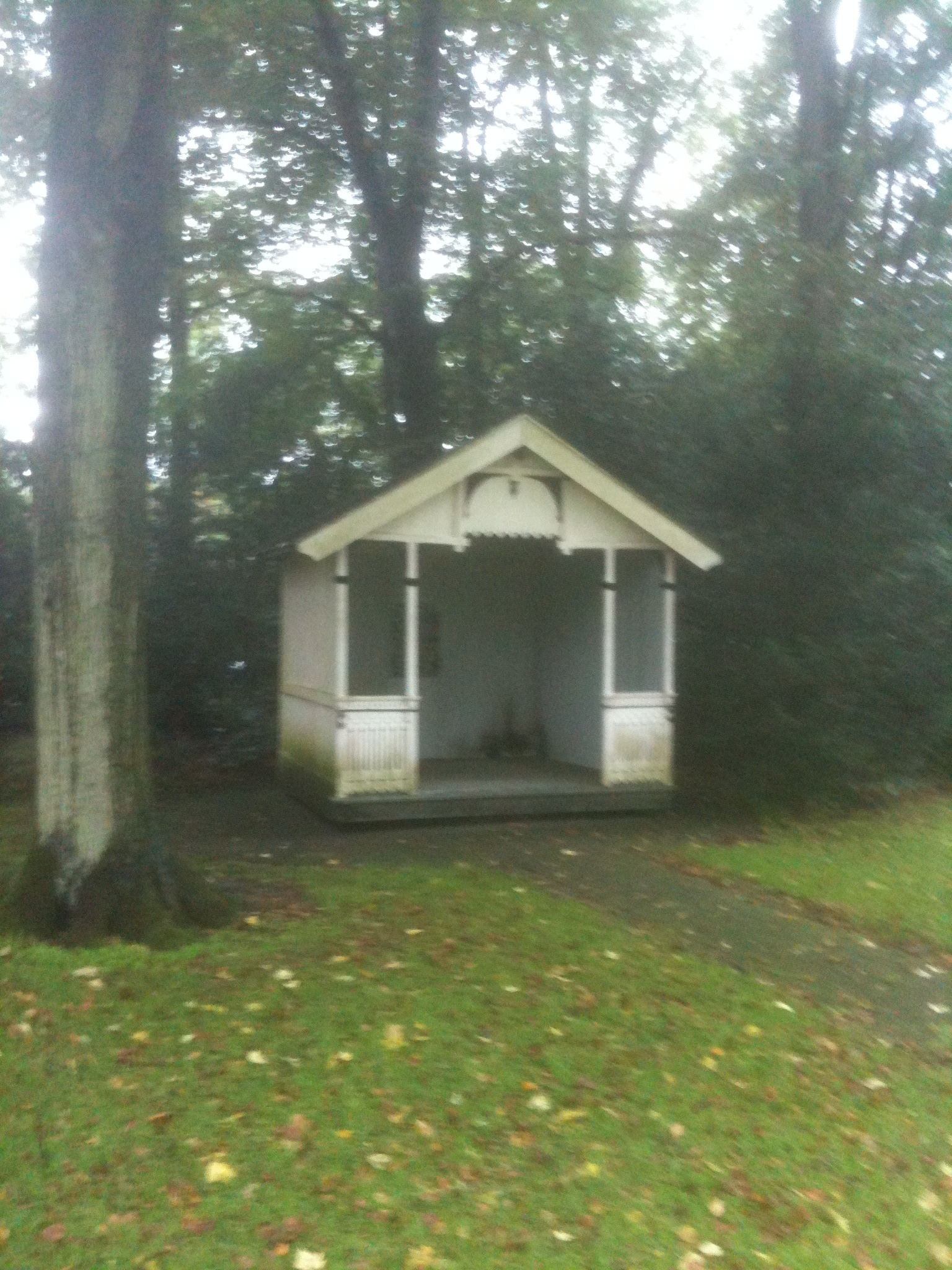 Preel in de tuin van monumentaal pand Woudoord op de Koningin Wilhelminaweg 11 te Heerenveen.